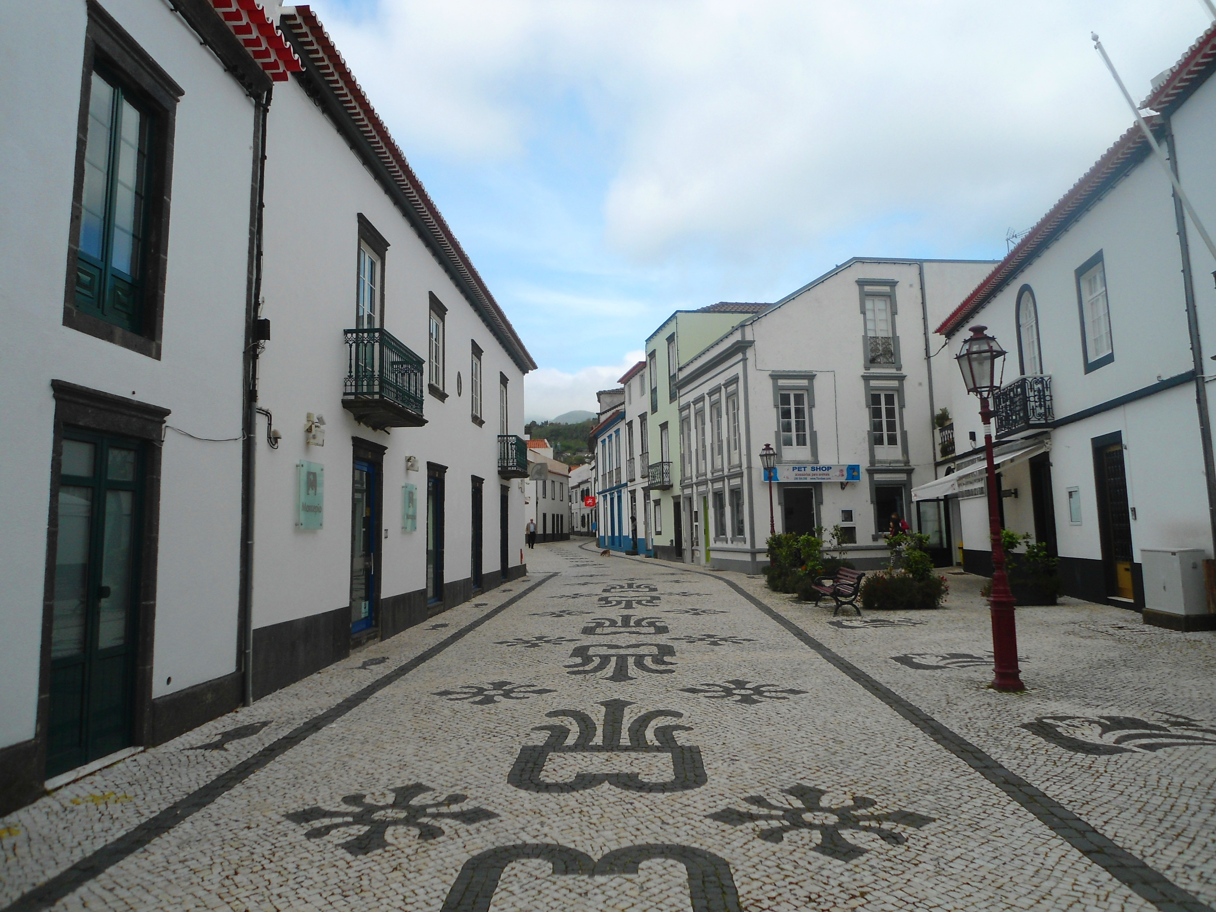 Rue de Povoaçao (Sao Miguel - Açores)